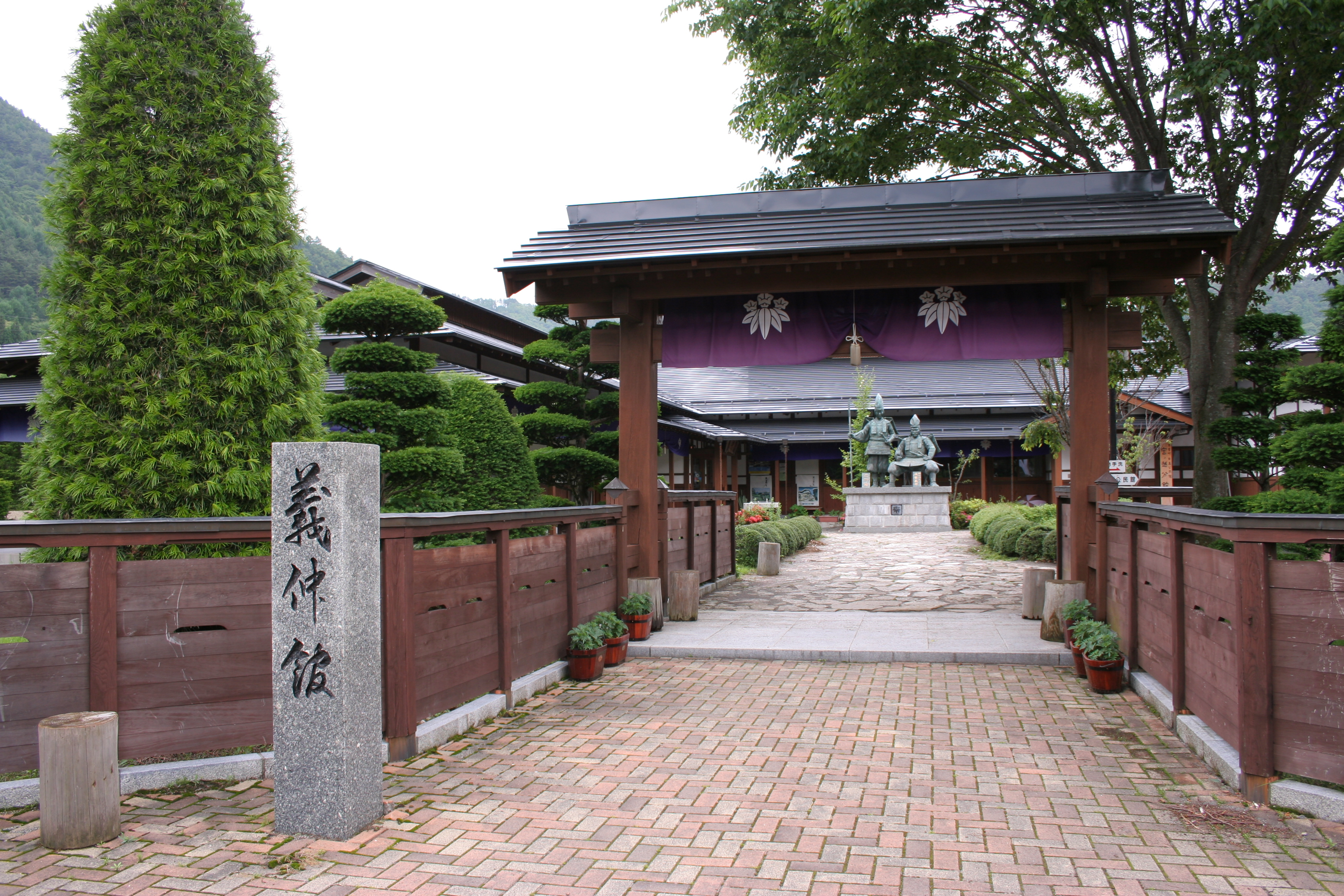 木曽義仲の資料館